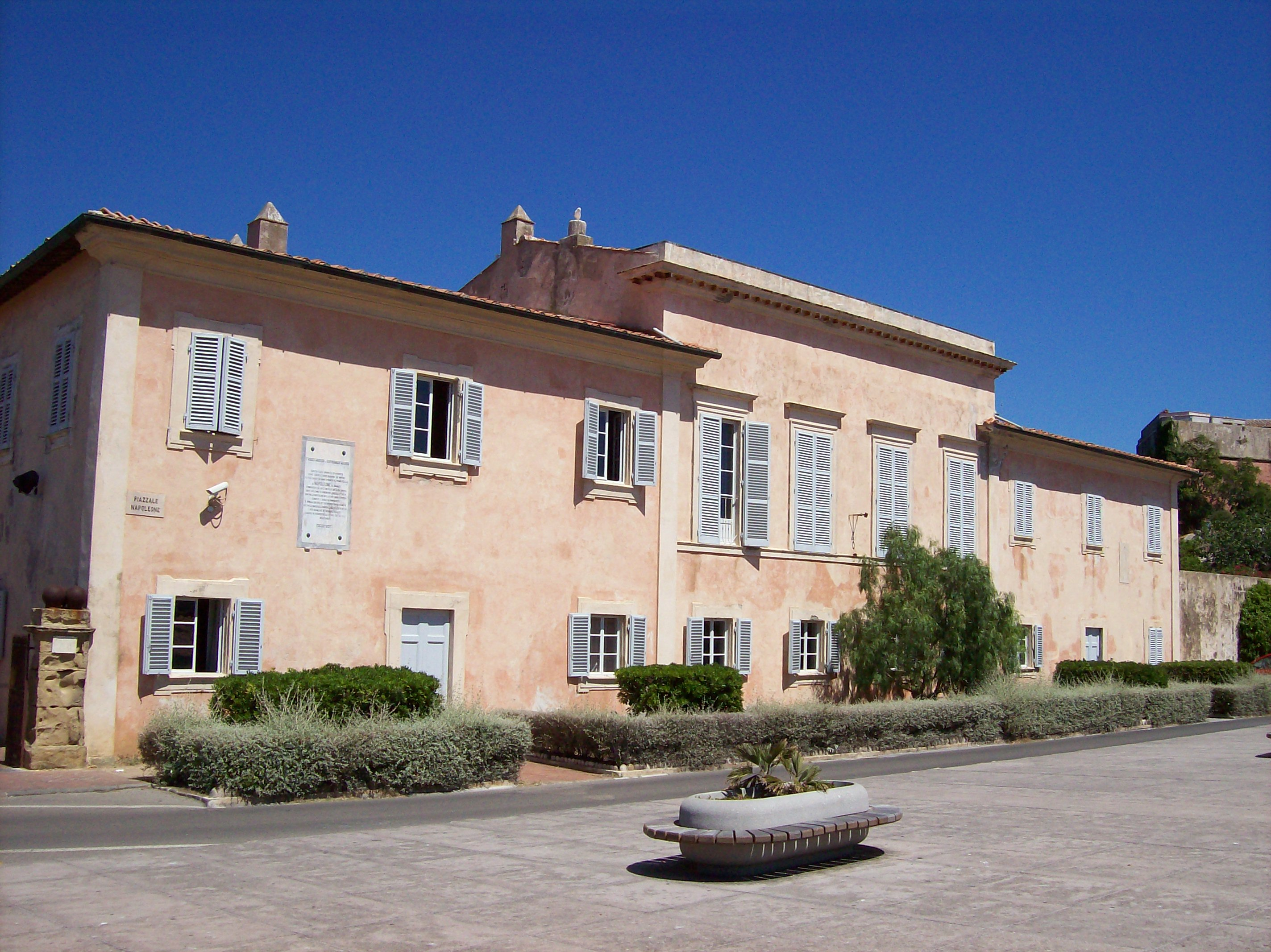 Casa di Napoleone I a Porto Ferraio